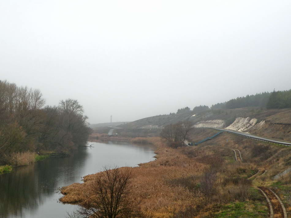 Белгородское Белогорье 2010. Святой источник по дороге из Верхнего Ольшана в Чесночное.